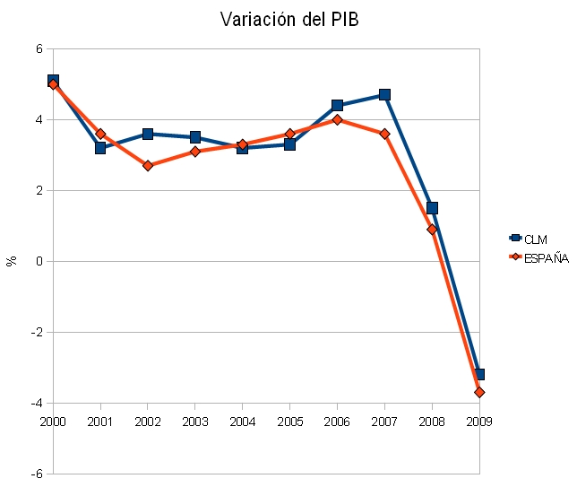 Comparación de la variación del PIB en Castilla-La Mancha y España desde el año 2000